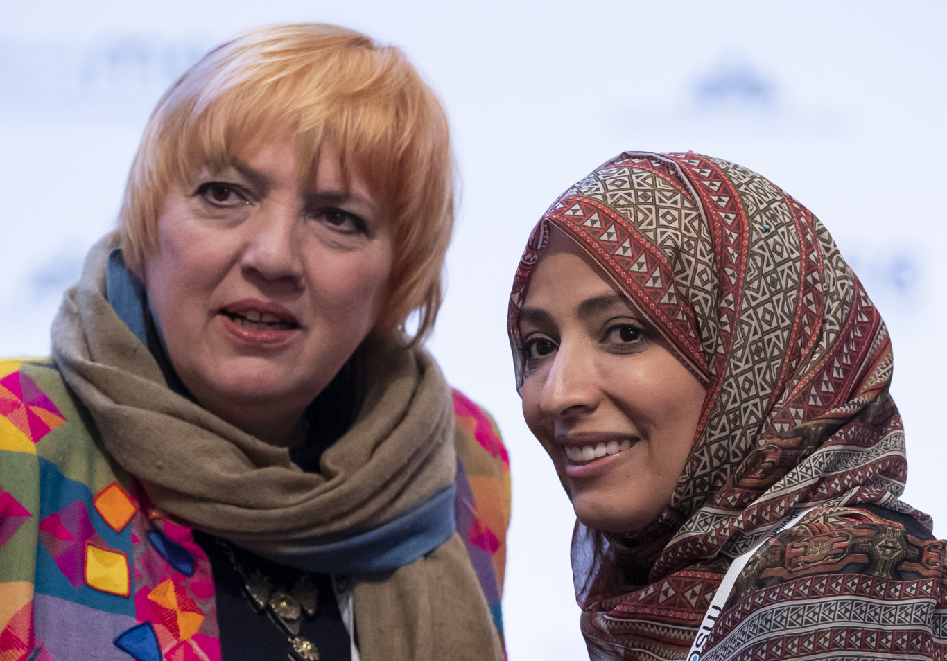 Claudia Roth und Tawakkol Karman während der Münchener Sicherheitskonferenz 2019